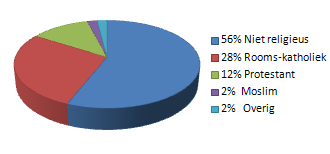 Pergentages religies van totale bevolking West-Friesland.